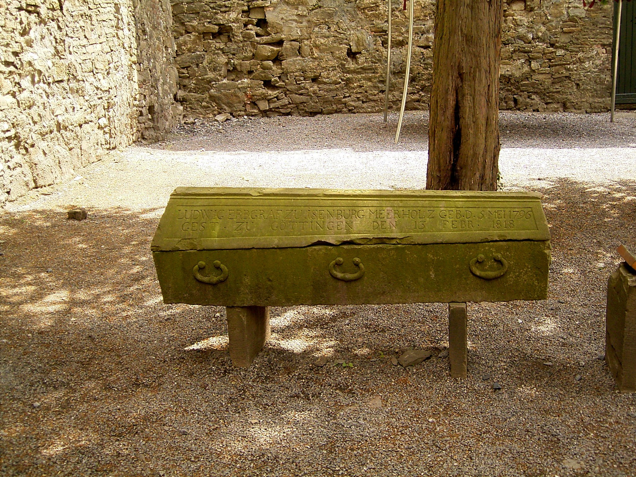 Schloss Hohenlimburg in Hagen-Hohenlimburg. Kenotaph. Text: Ludwig Erbgraf zu Isenburg Meerholz, geboren den 5. Mai 1796, gestorben zu Göttingen den 13. Februar 1818.